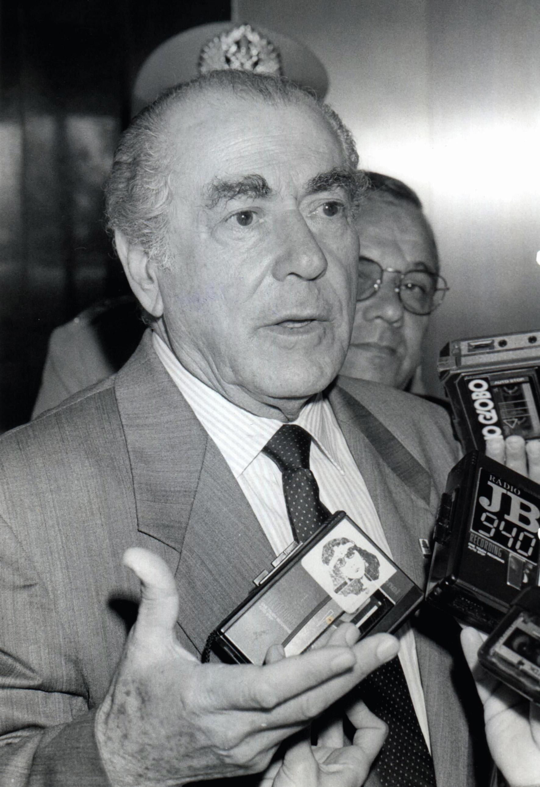 O político brasileiro Leonel Brizola.